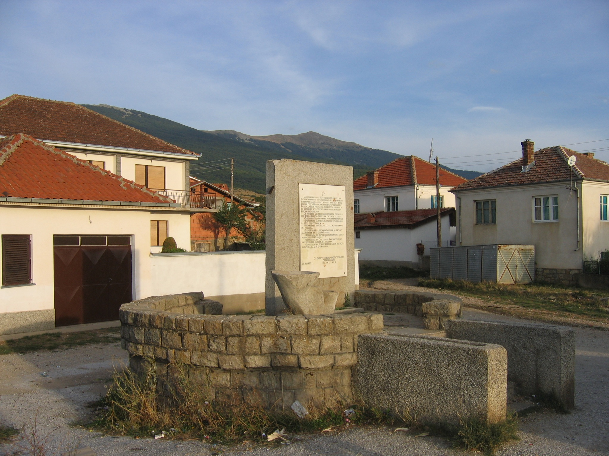 Паметник в село Подмочани, Република Македония.